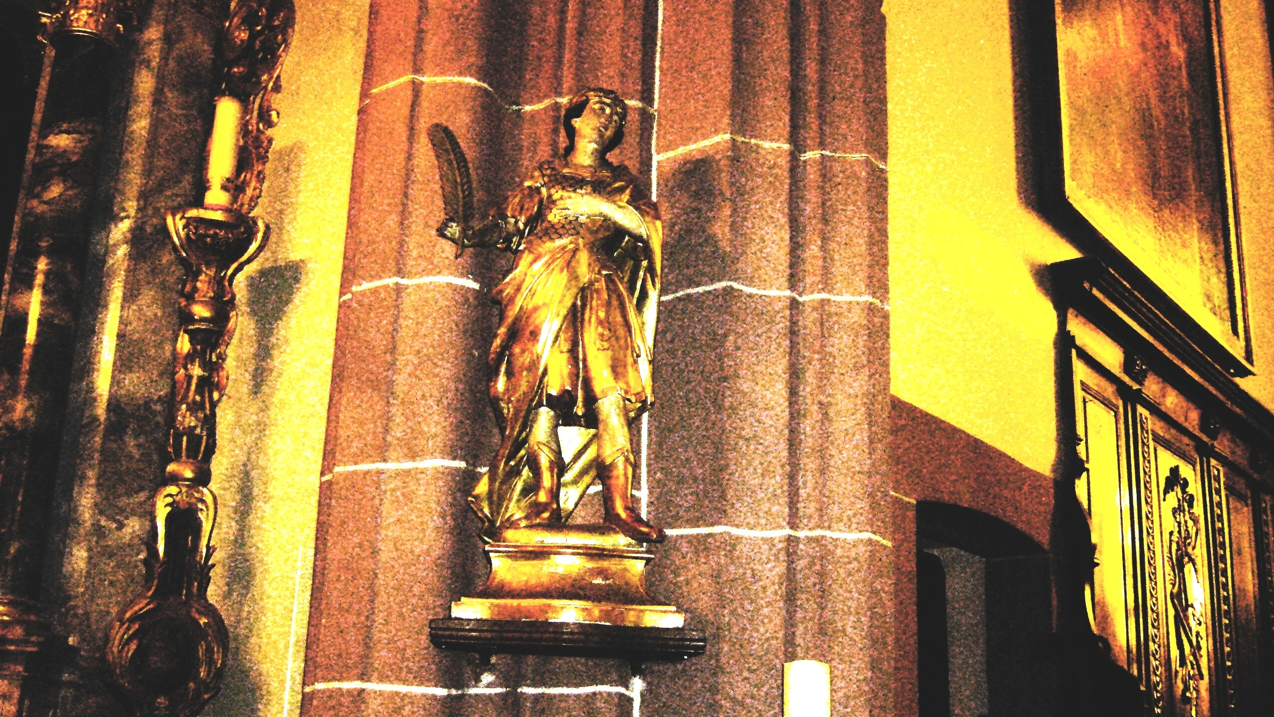 Statue de Saint-Hippolyte installée à l'intérieur de l'église